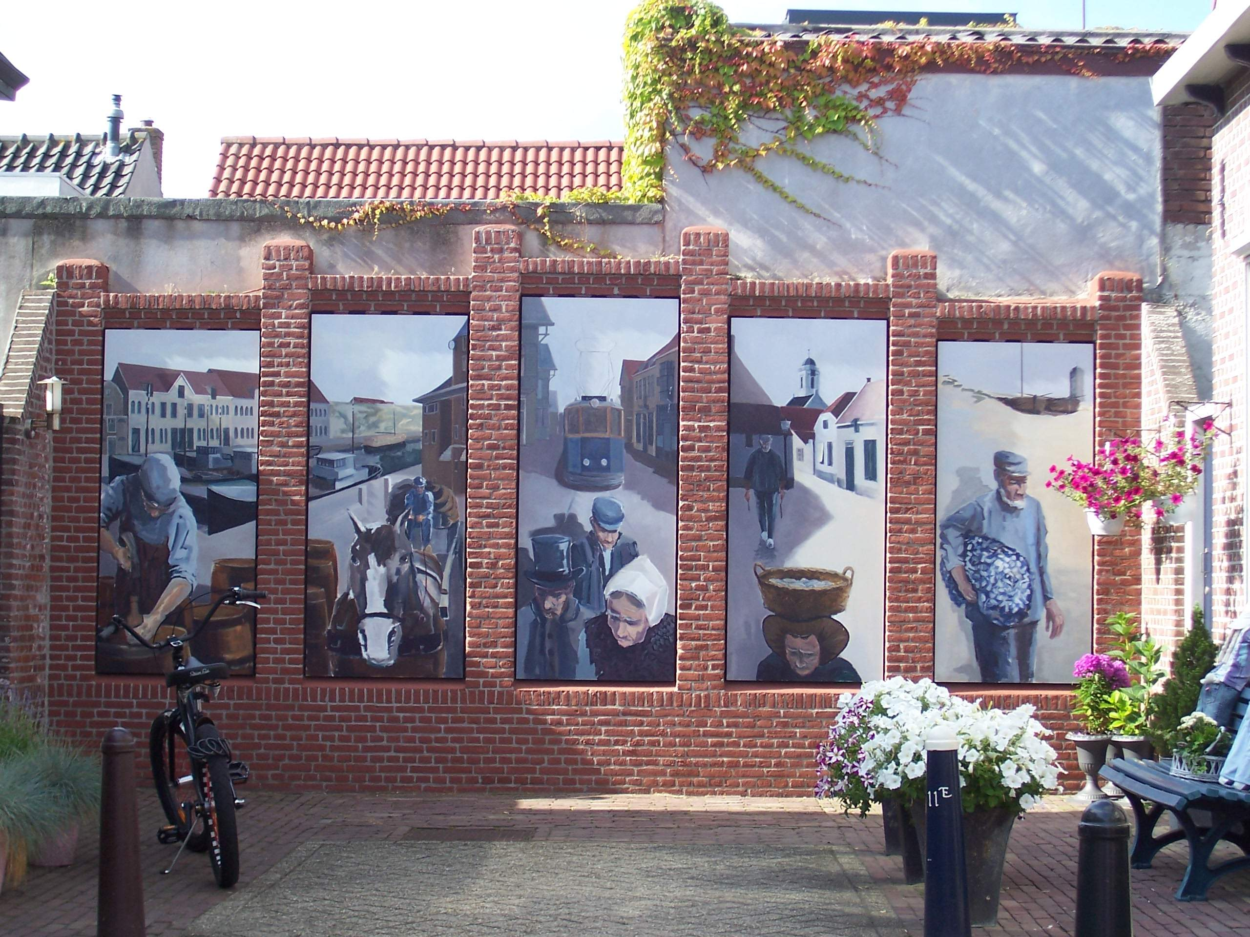 Muurschildering, Jan Tooropstraat, Katwijk aan Zee, 2009. Foto gemaakt op 6 augustus 2010